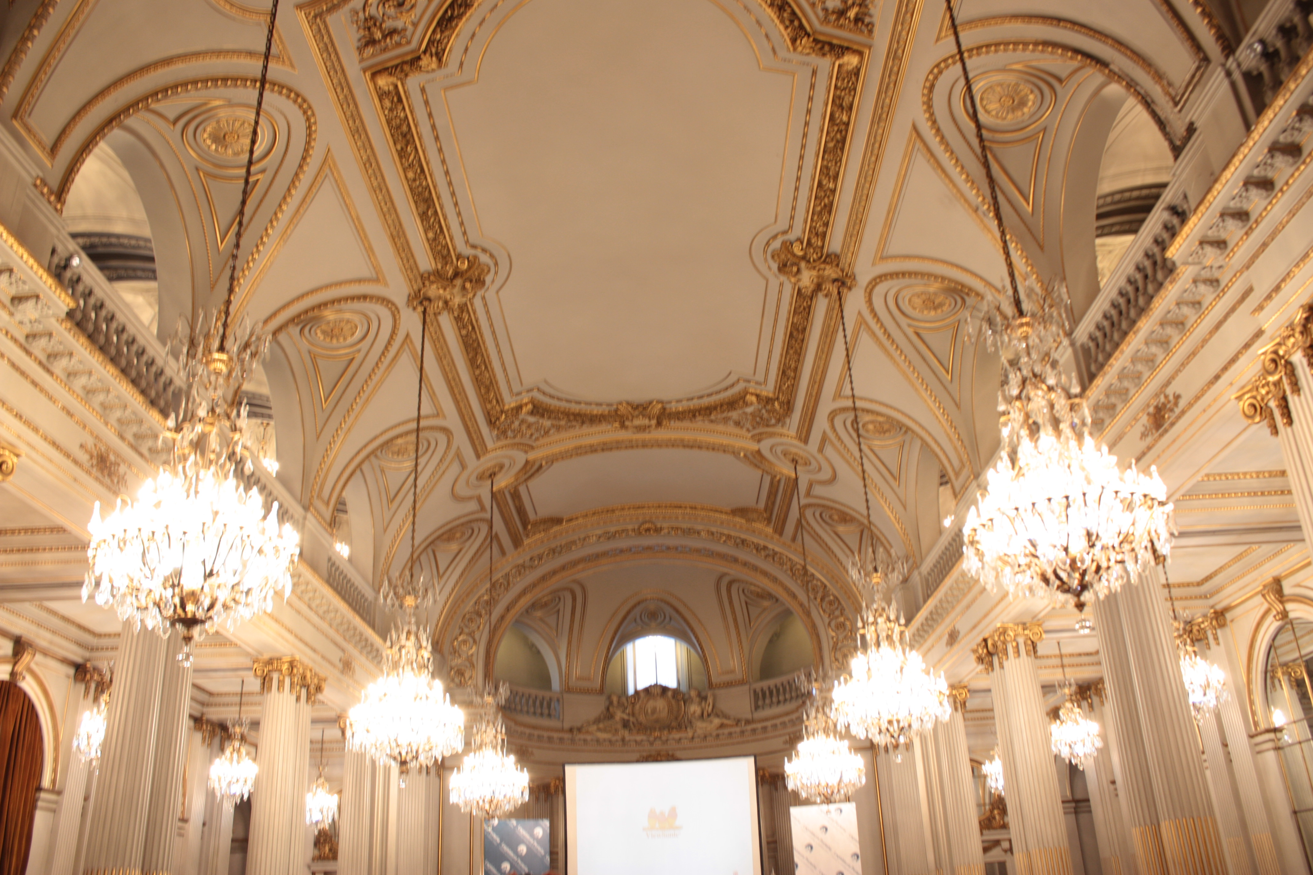 english